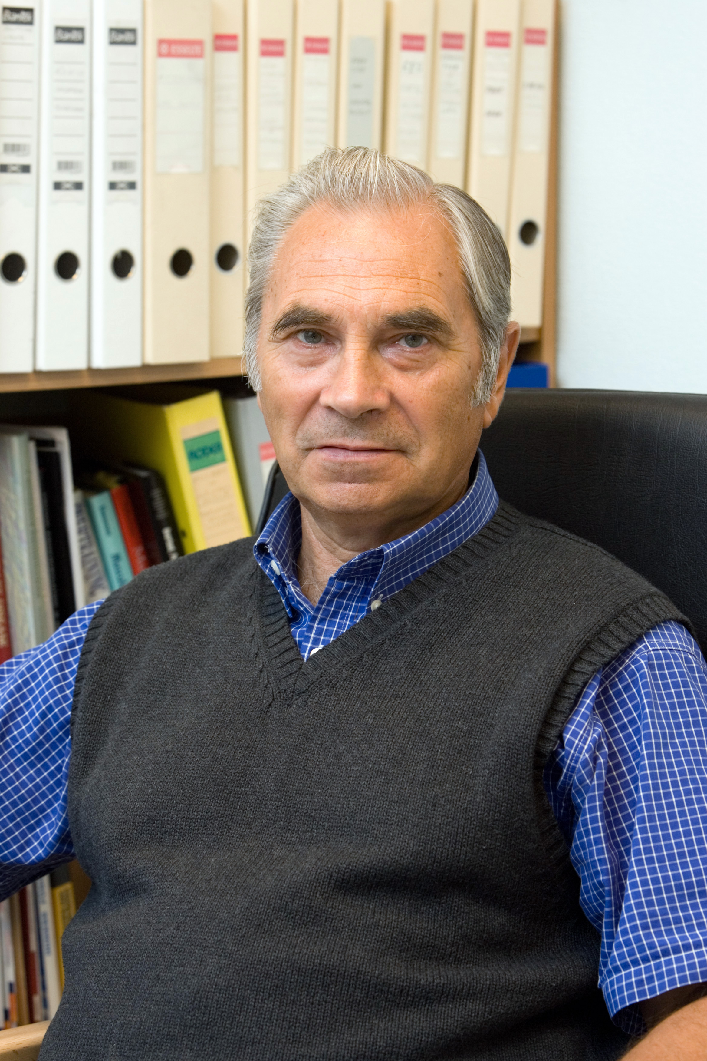 TÜ spordibioloogia ja füsioteraapia instituudi funktsionaalse morfoloogia õppetooli erakorraline vanemteadur Teet Seene.